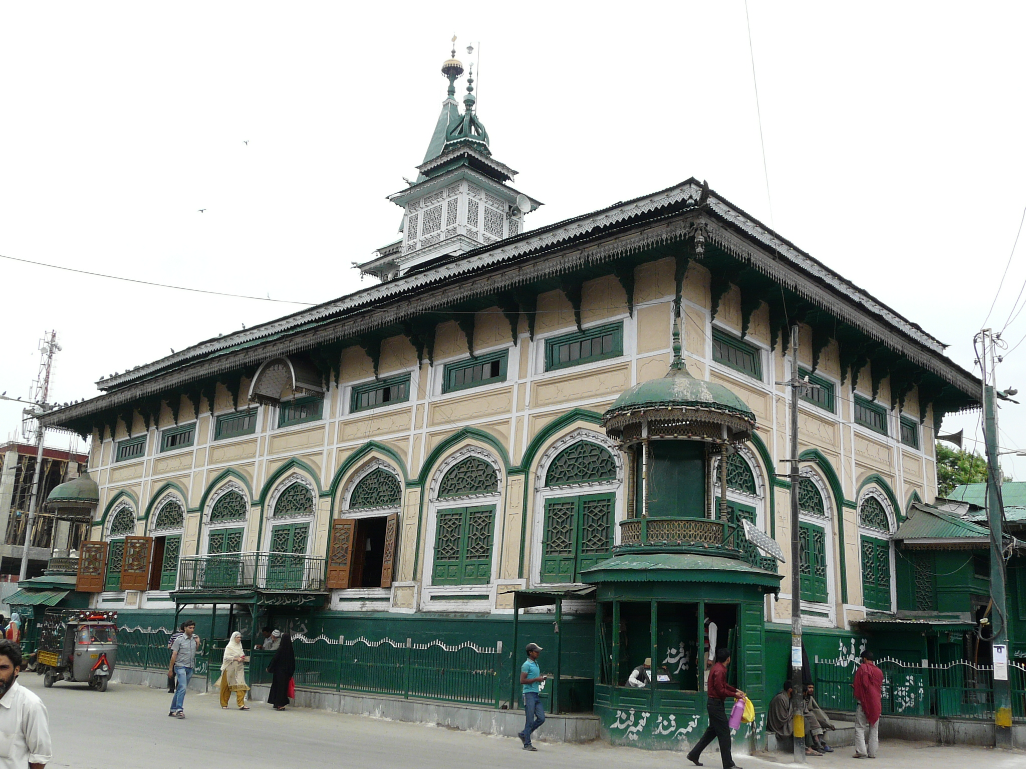 Dastgir Sahib Dastgeer Sahib, Srinagar, Jammu and Kashmir, India